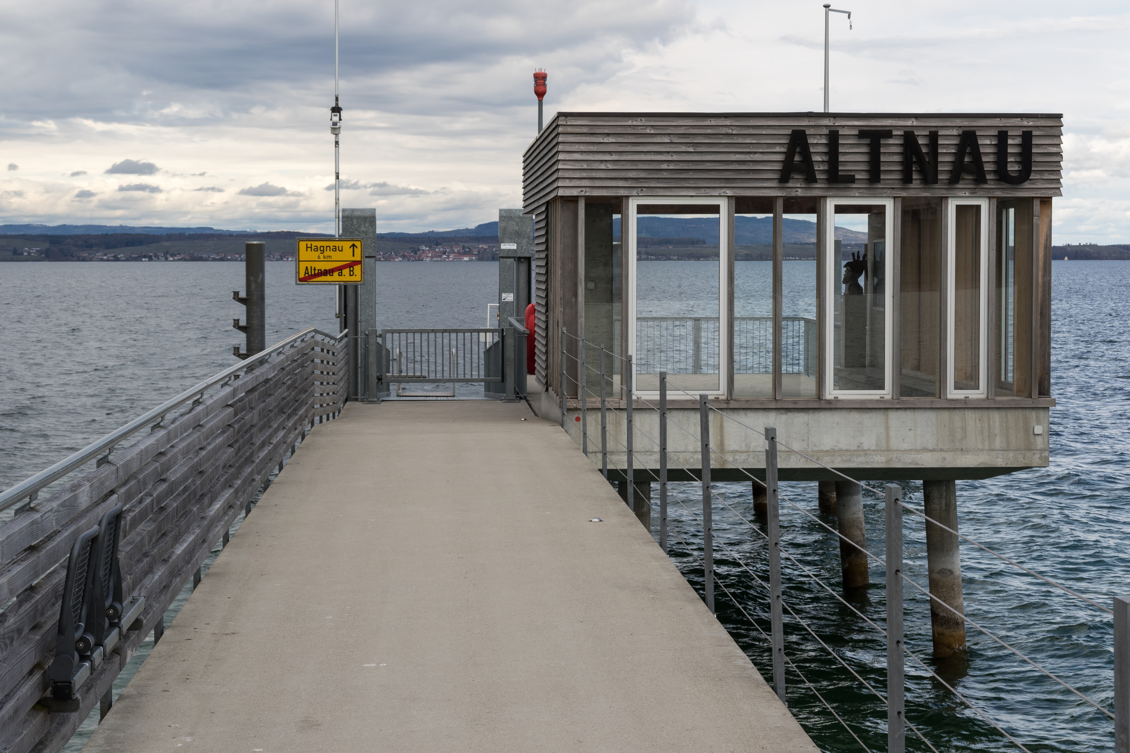 Der im Jahre 2009 in Betrieb genommene neue Schiffsanleger (Schiffslände) in Altnau TG